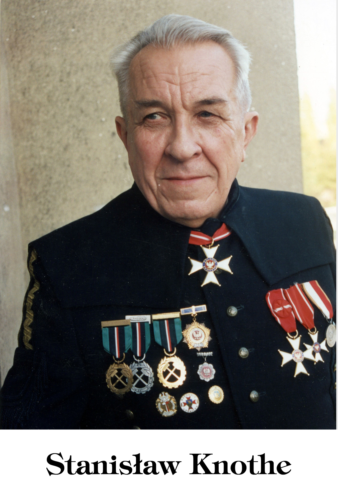 Prof. Stanisław Knothe był odznaczony między innnymi: Krzyżem Kawalerskim (1969 r.), Krzyżem Oficerskim (1975) i Krzyżem Komandorskim (1986) Orderu Odrodzenia Polski.